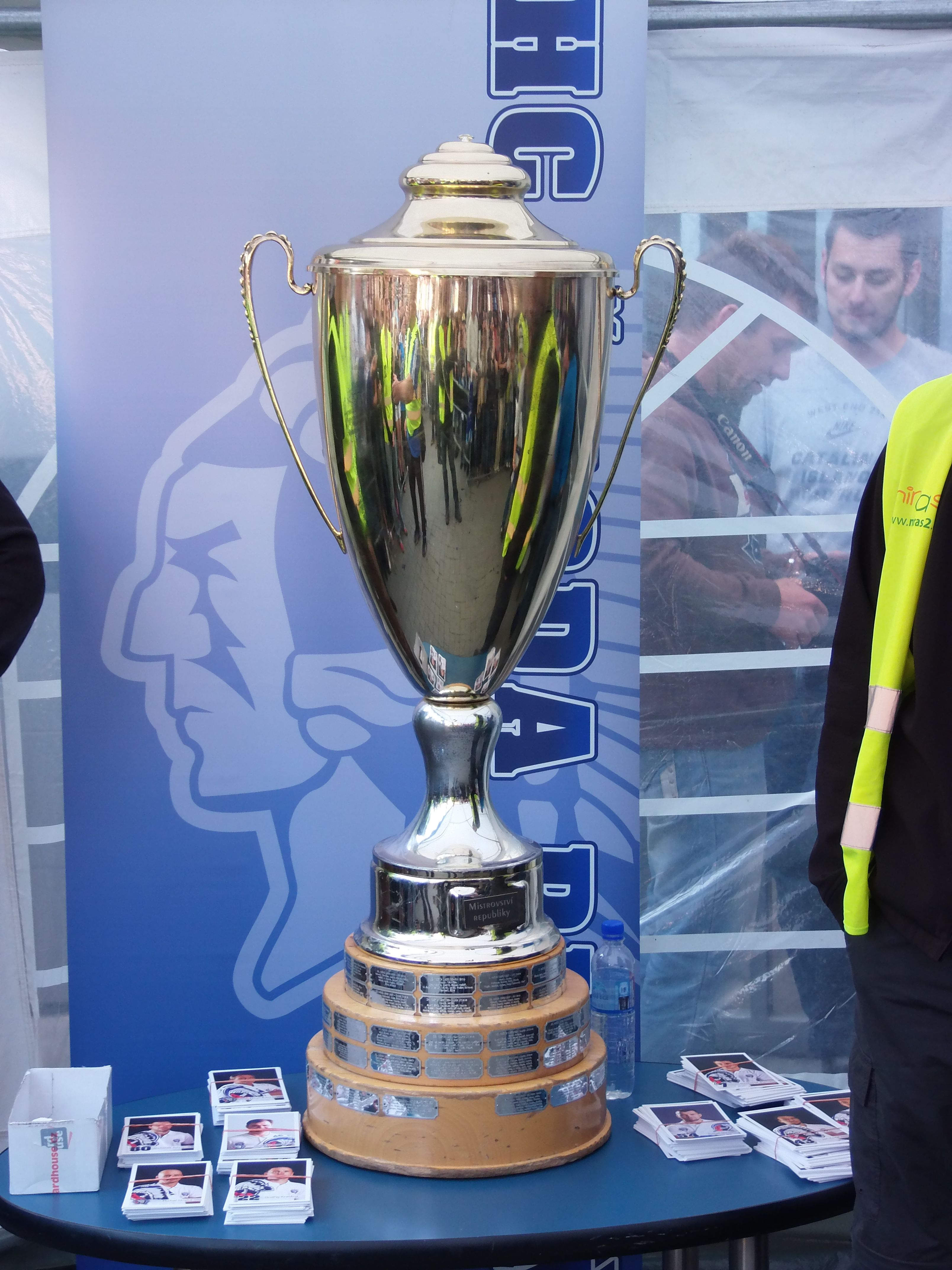 Pohár pro vítěze české extraligy ledního hokeje, foceno v Plzni po zisku titulu v sezíně 2012/13